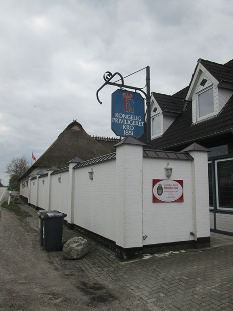 Den Historiske Kro i Oversø